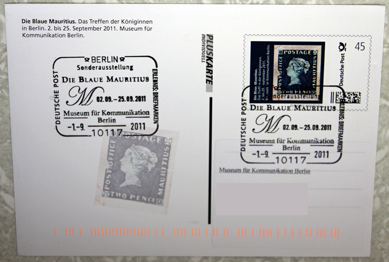 Postkarte-Individuell, gab es zum Eröffnungsabend der Mauritius-Briefmarken-Ausstellung im Museum für Kommunikation Berlin